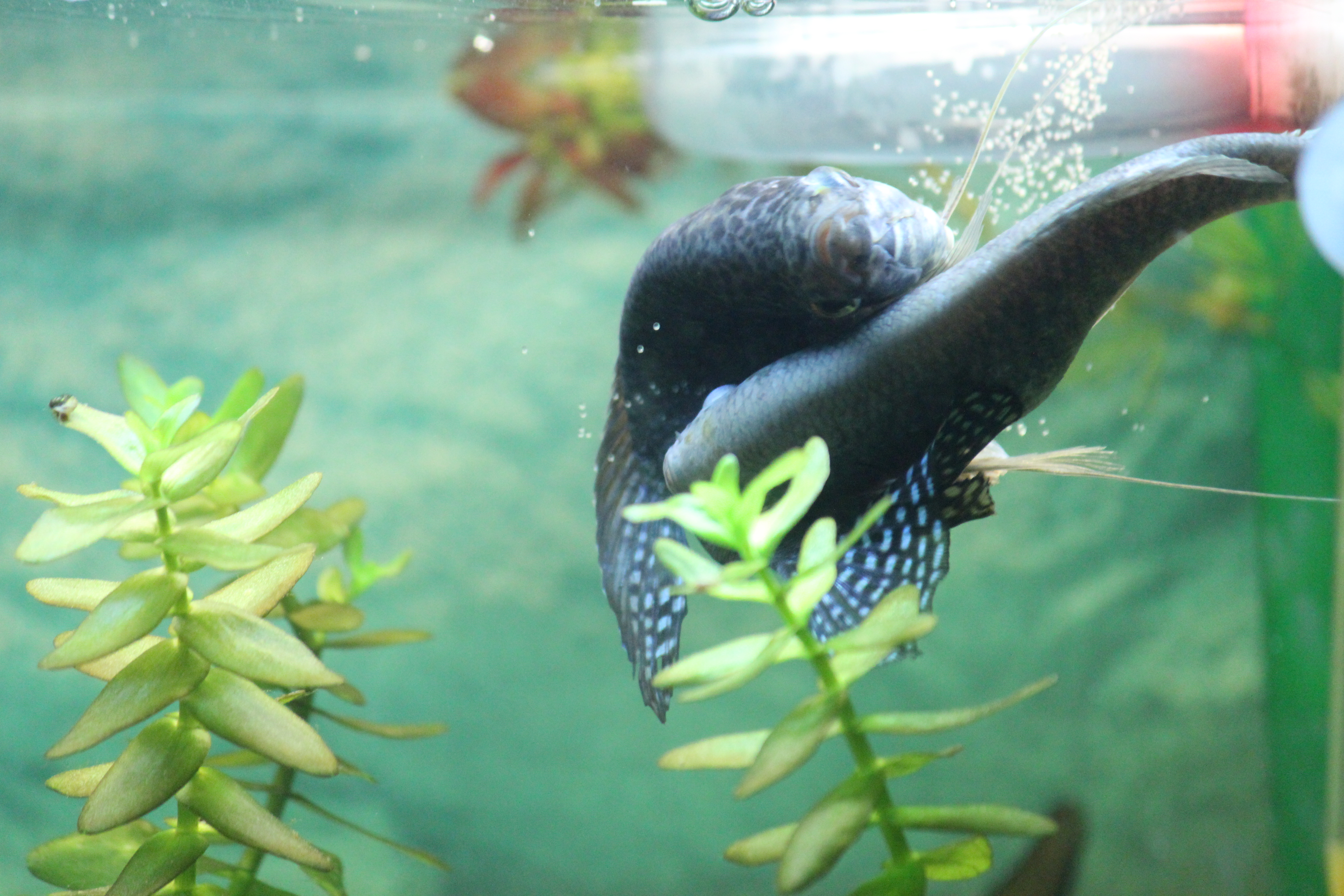 Paarung von Trichogaster Trichopterus